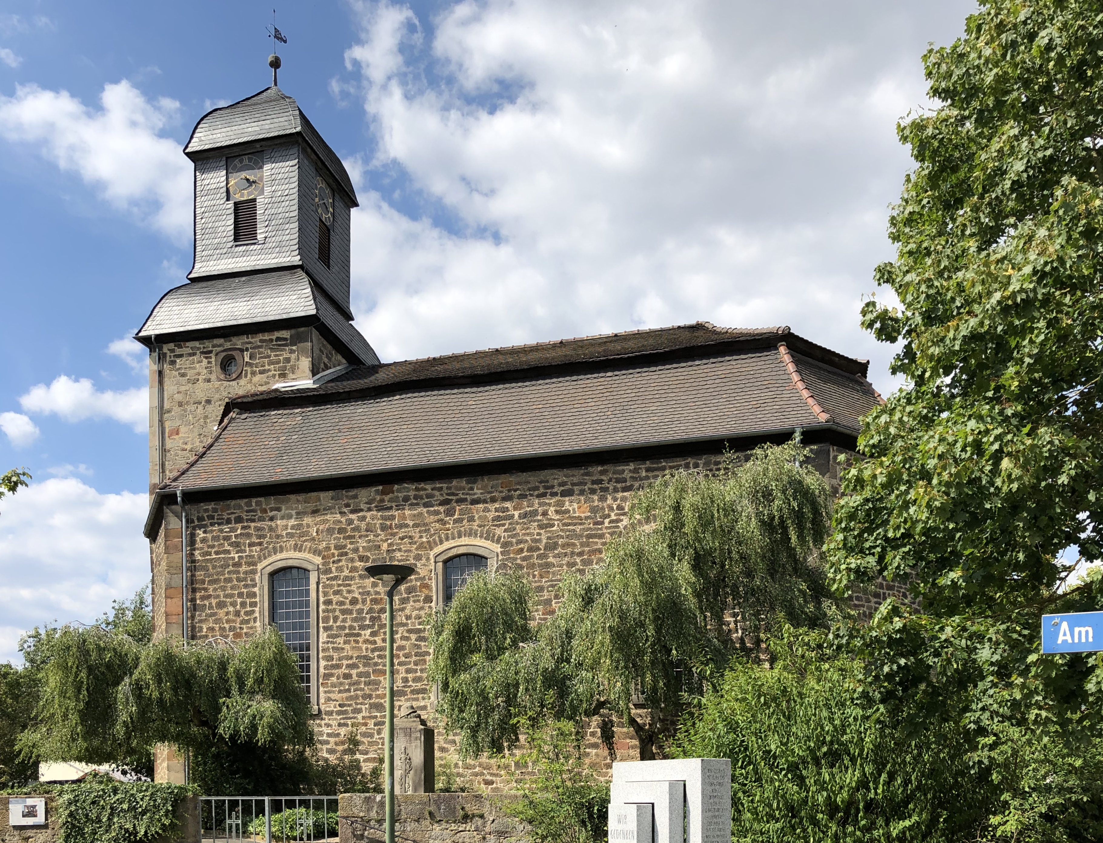 Außenansicht Südseite